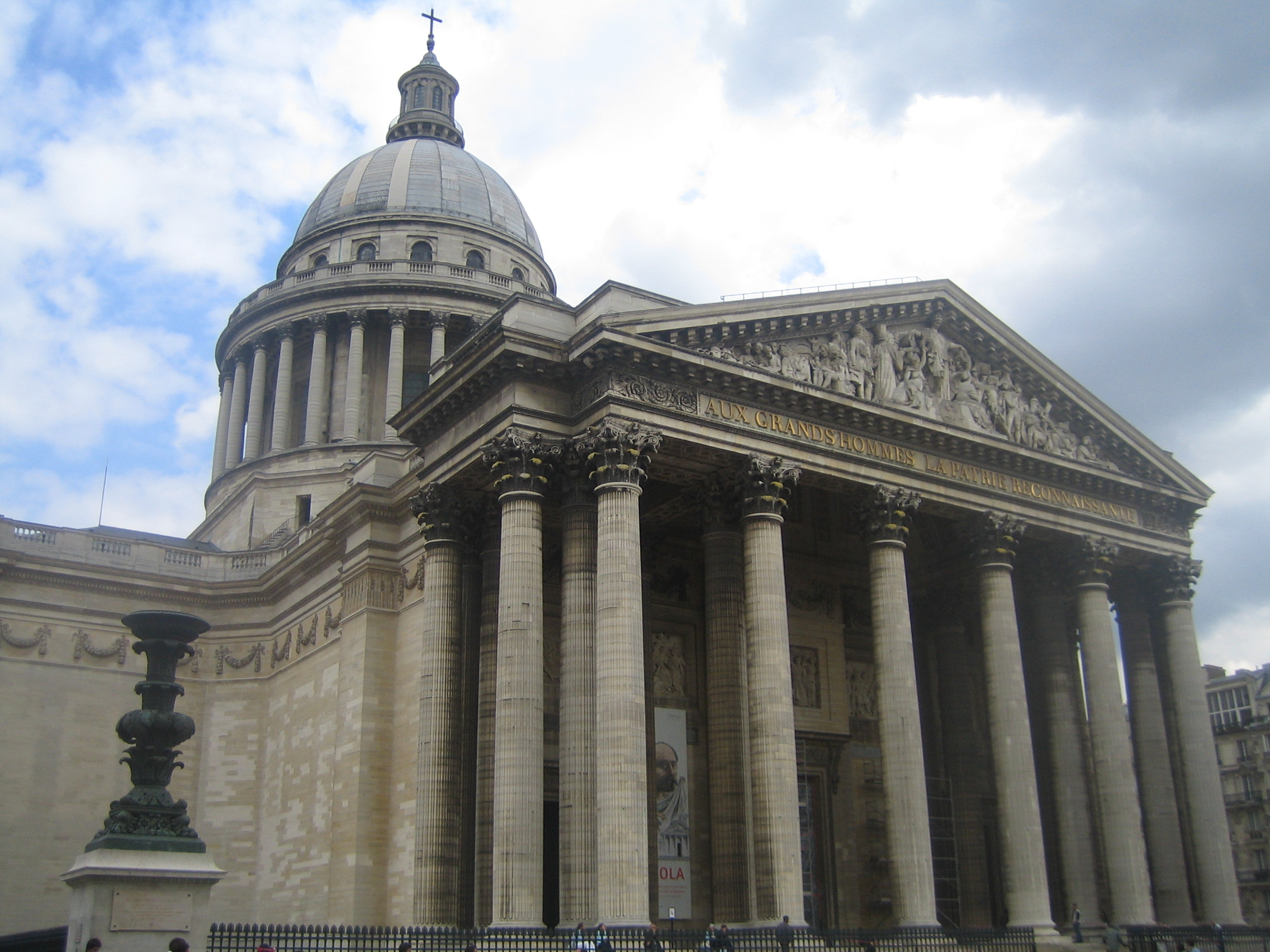 Le Panthéon, Paris.